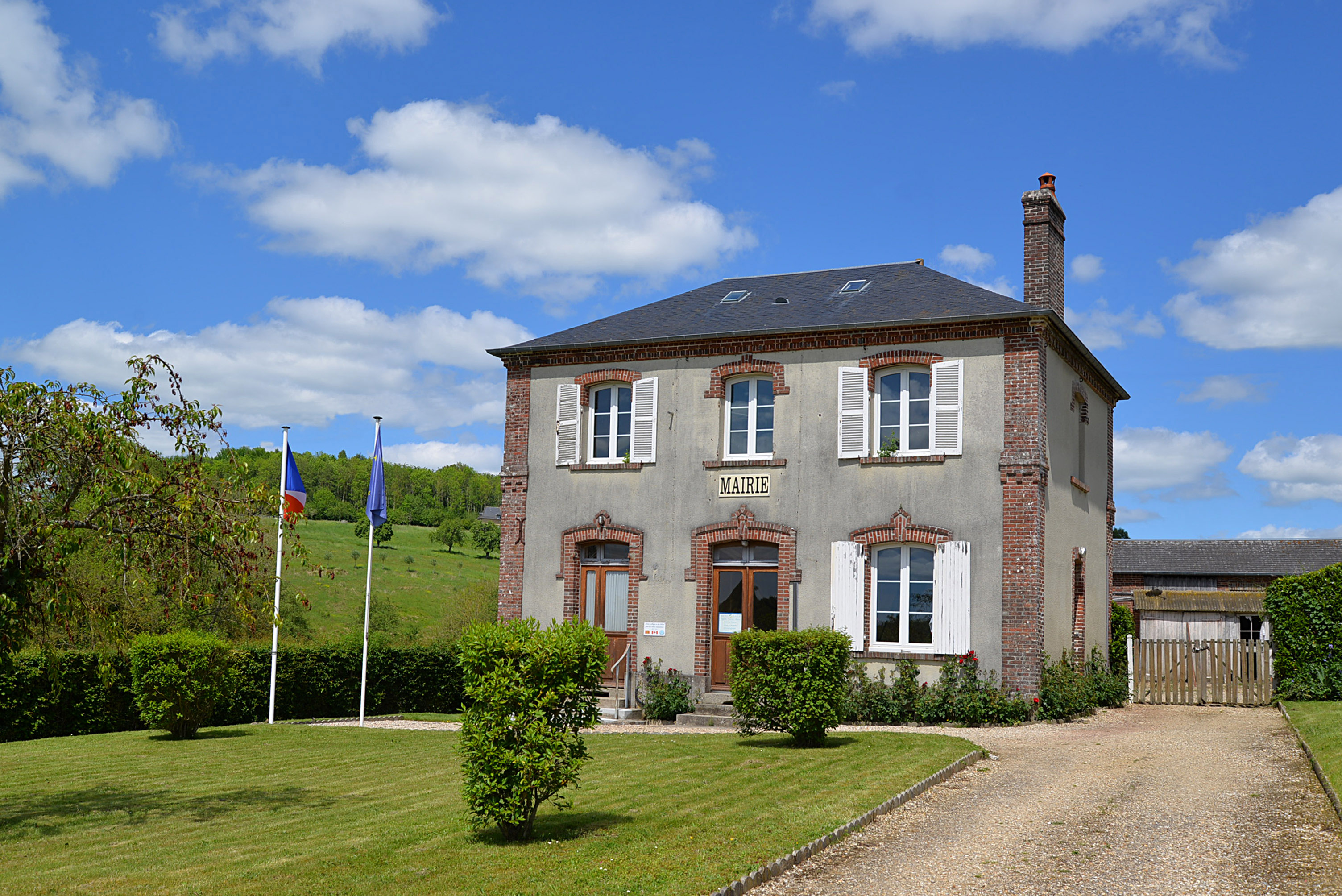 Saint-Denis-de-Mailloc (Calvados)